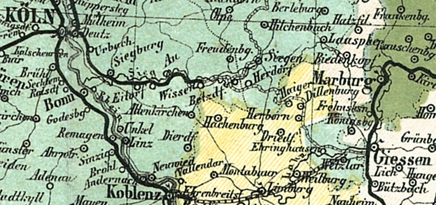 Ausschnitt Koeln-Giessen aus der Bahnkarte_Deutschland_1861